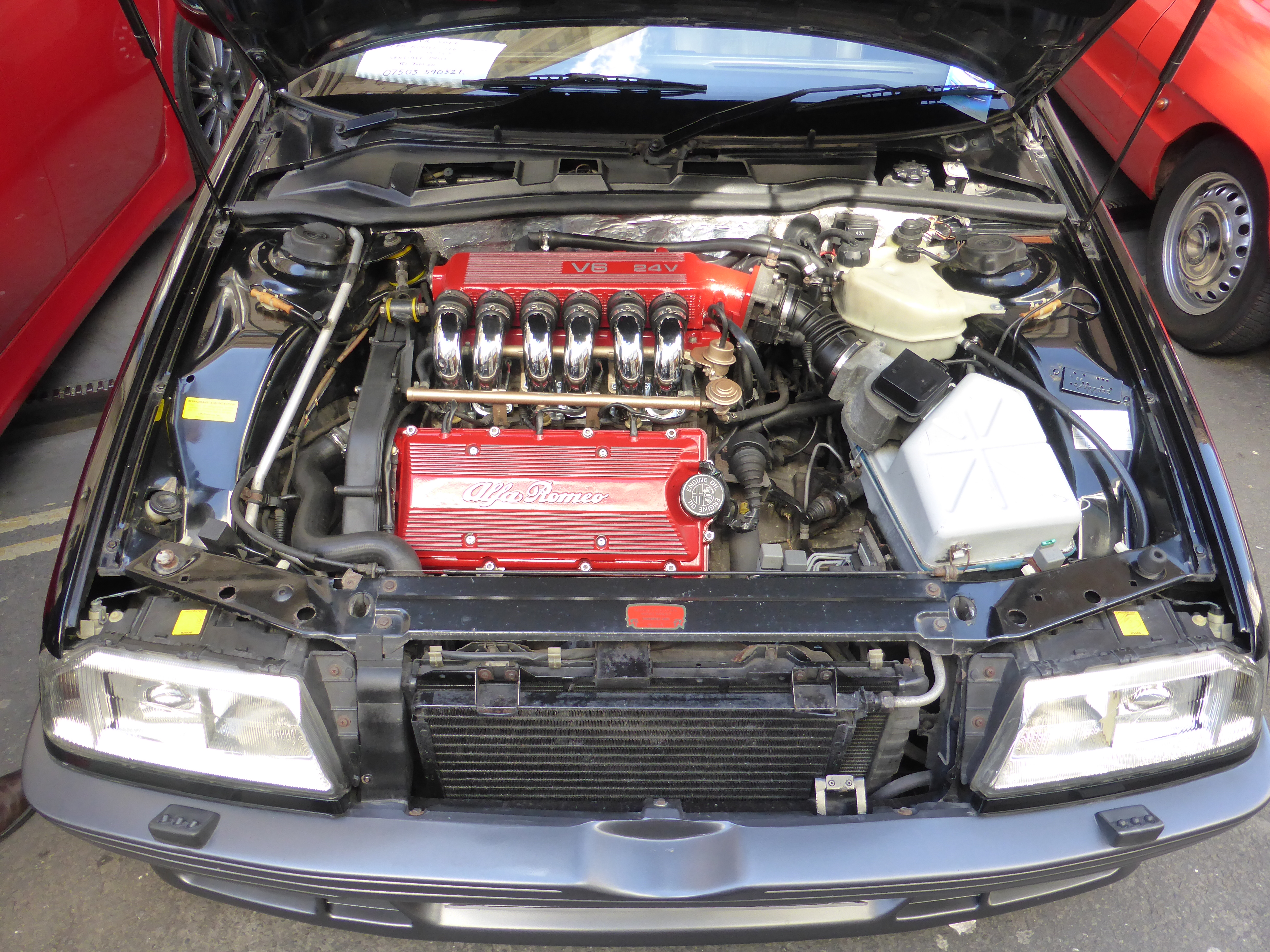 Bristol Italian AutoMoto Festival